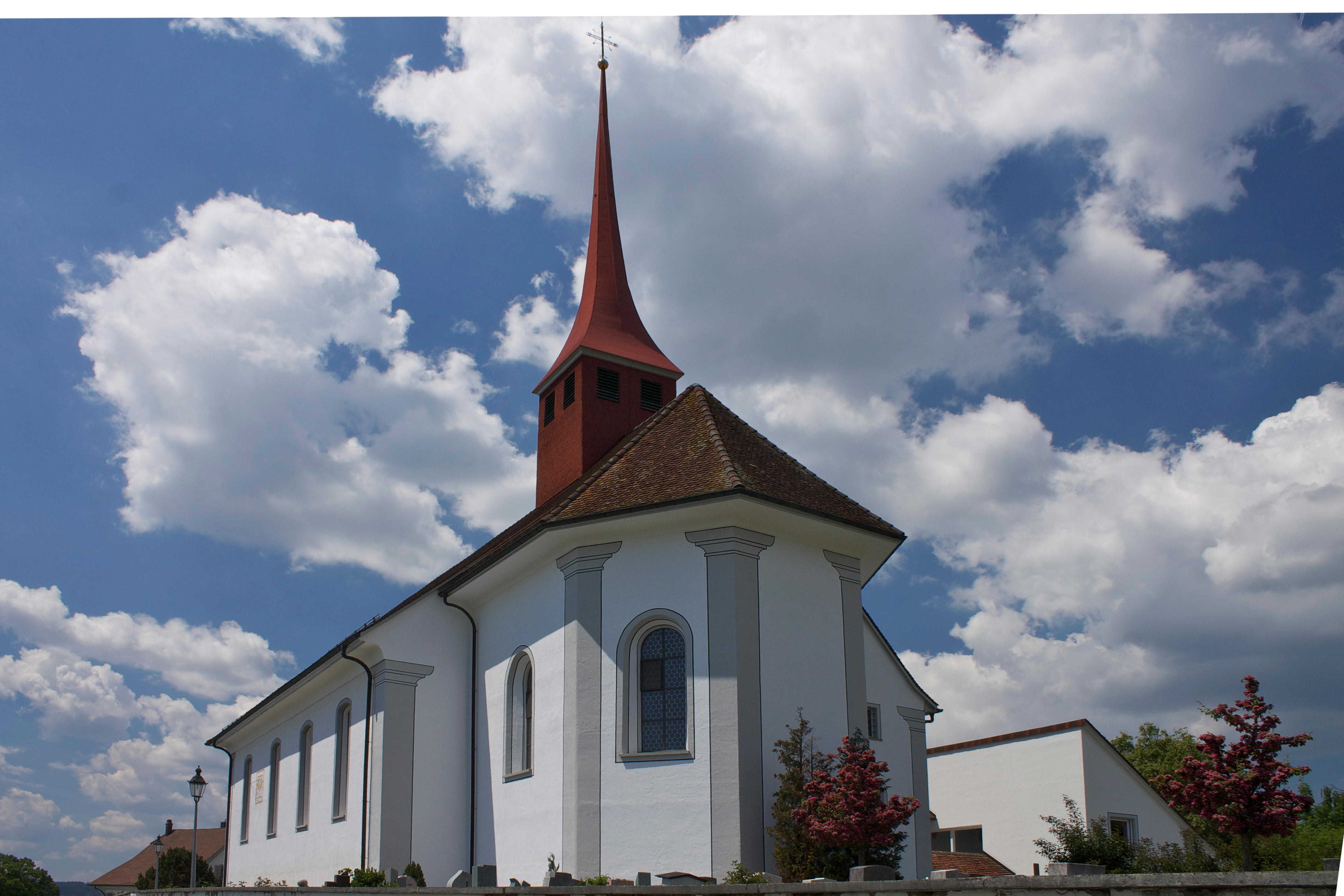 Kath. Kirche St. Gallus in Büron